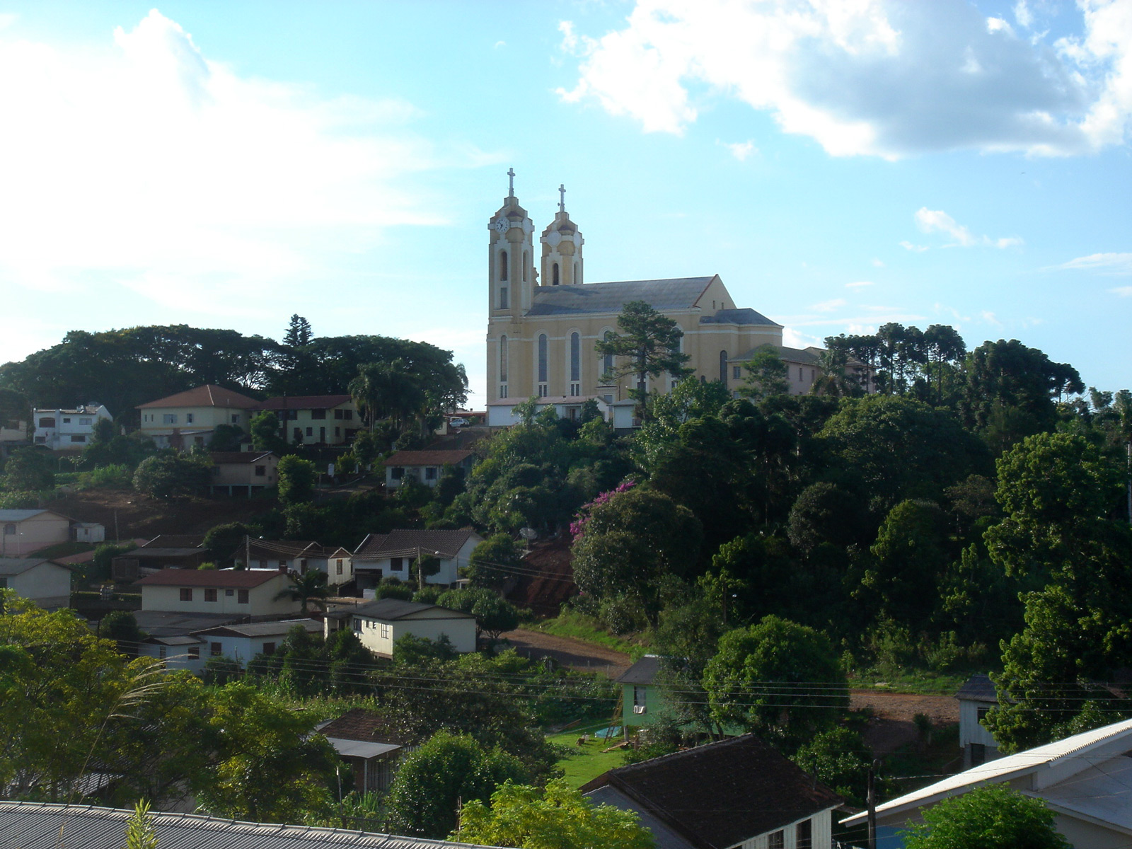 Igreja Matriz São Luís Gonzaga, localizada no ponto mais alto de Gaurama, município do Rio Grande do Sul, Brasil. Autor: Rodrigo Lupchinski.